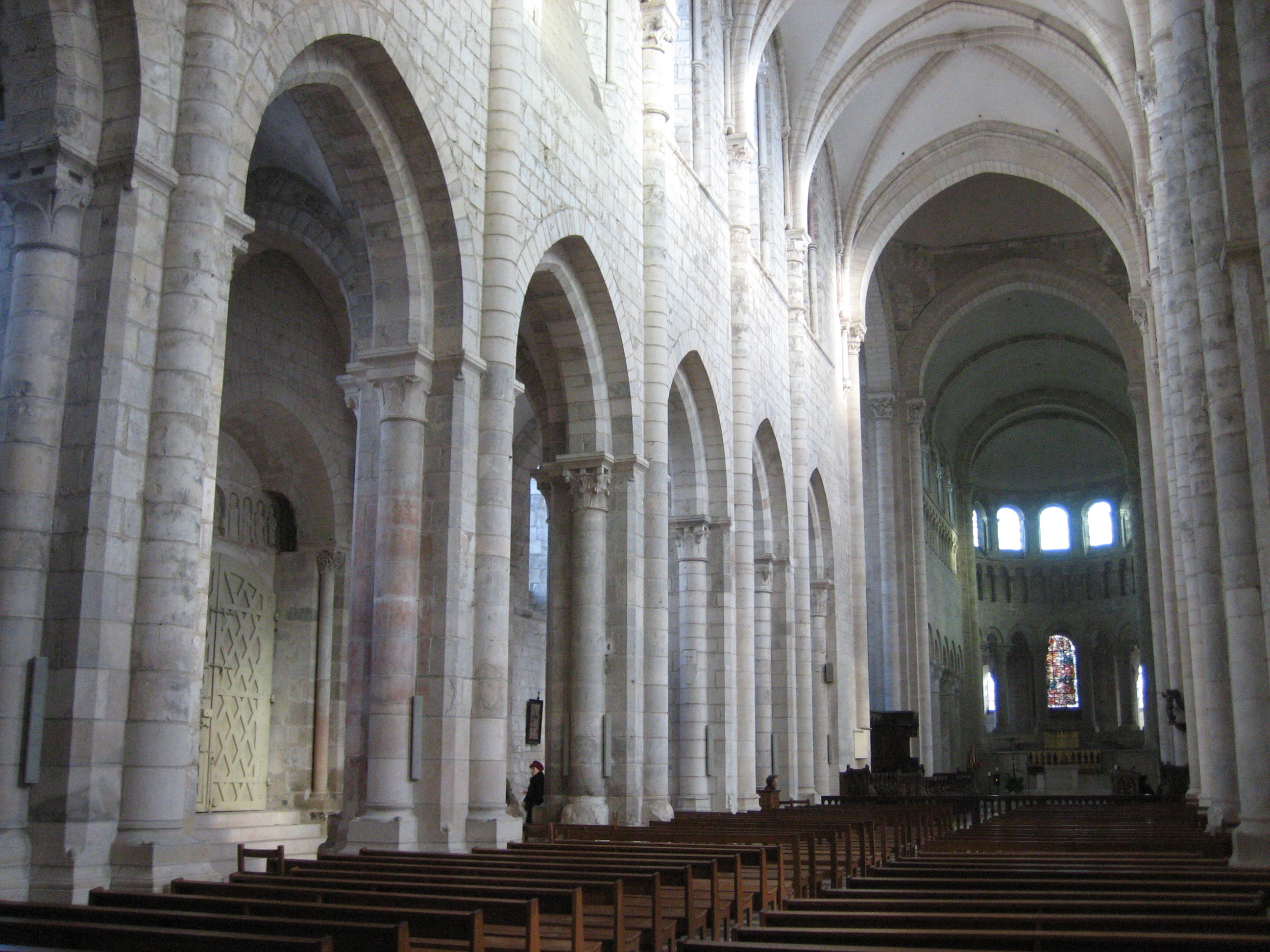 Intérieur de la Basilique